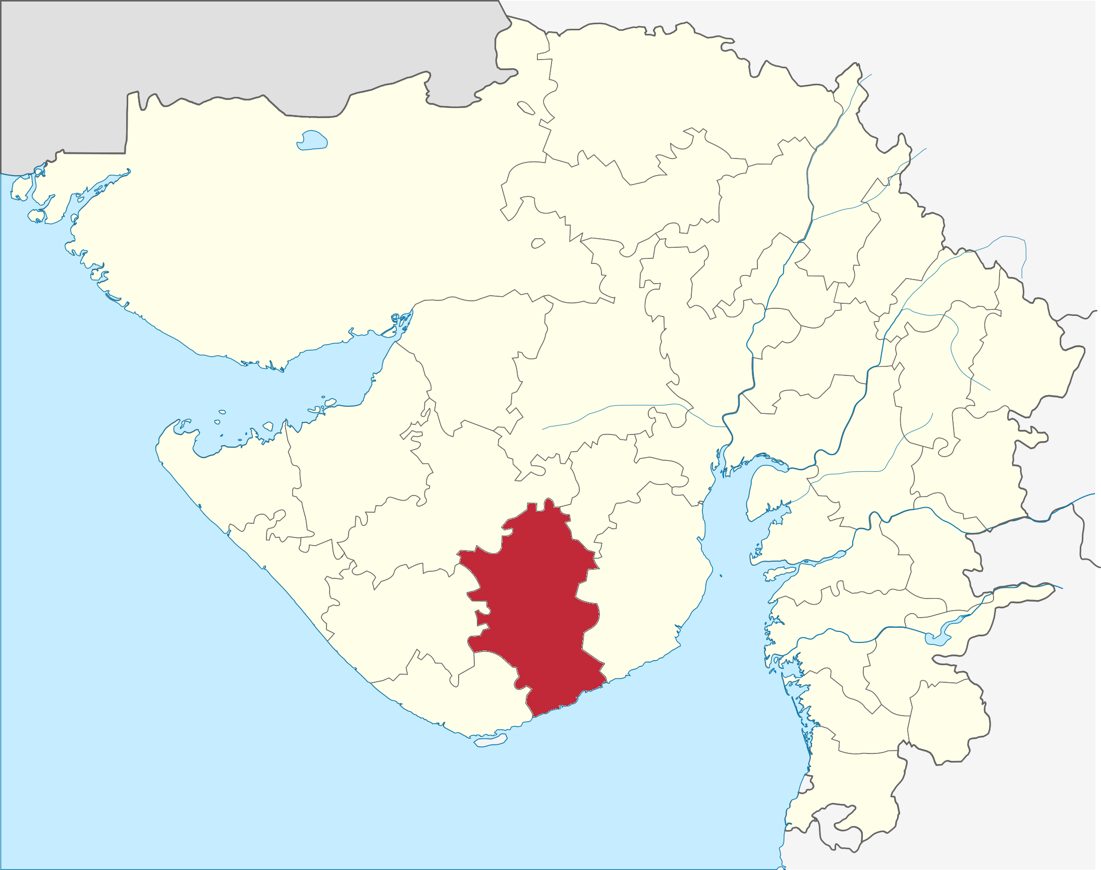 Distrito de Amreli en Gujarat